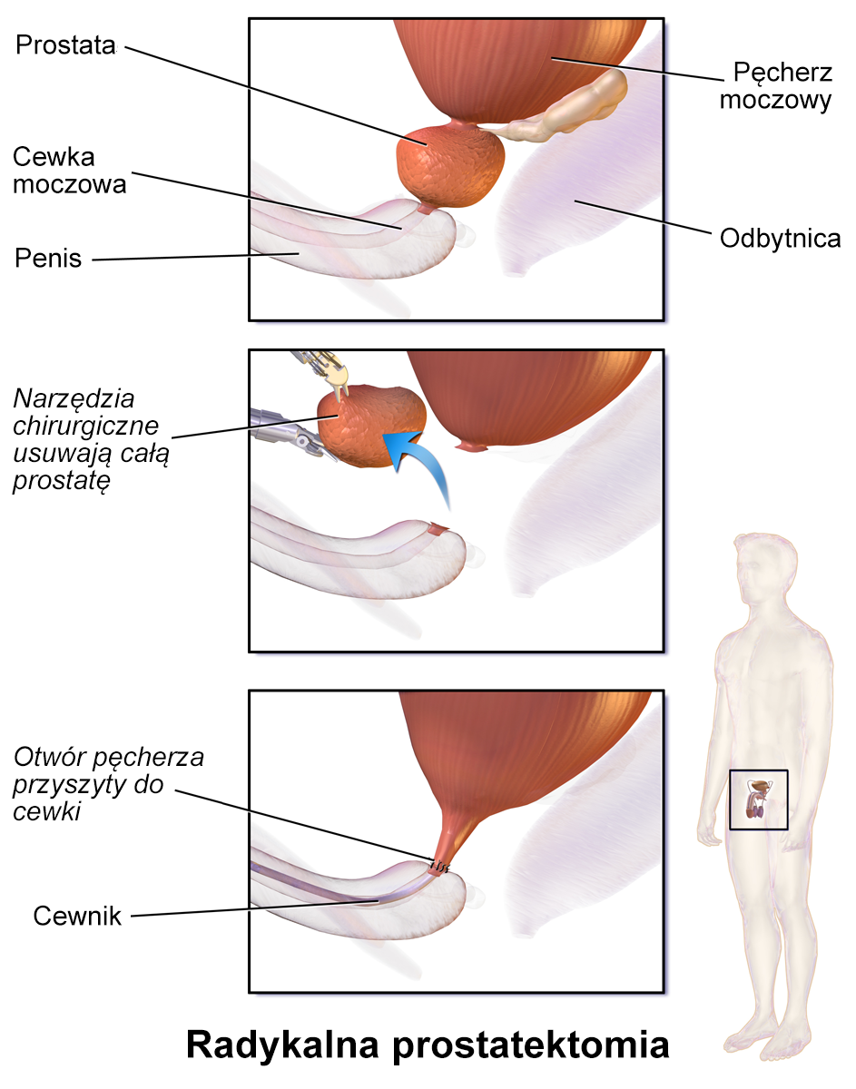 Usuwanie prostaty.